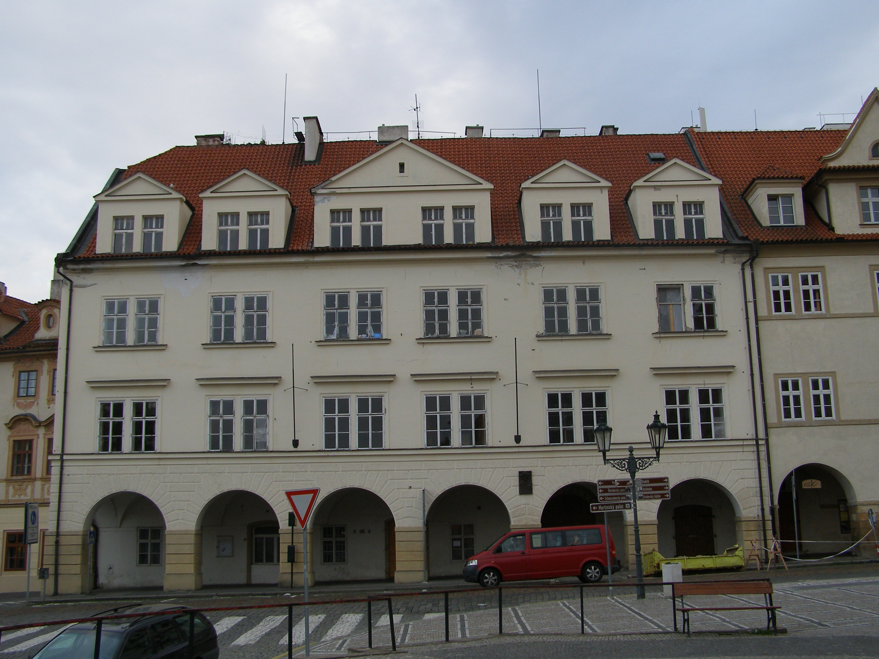 Měšťanský dům U Drahomířina sloupu, Praha 1, Loretánské nám., Úvoz 108/2, Hradčany